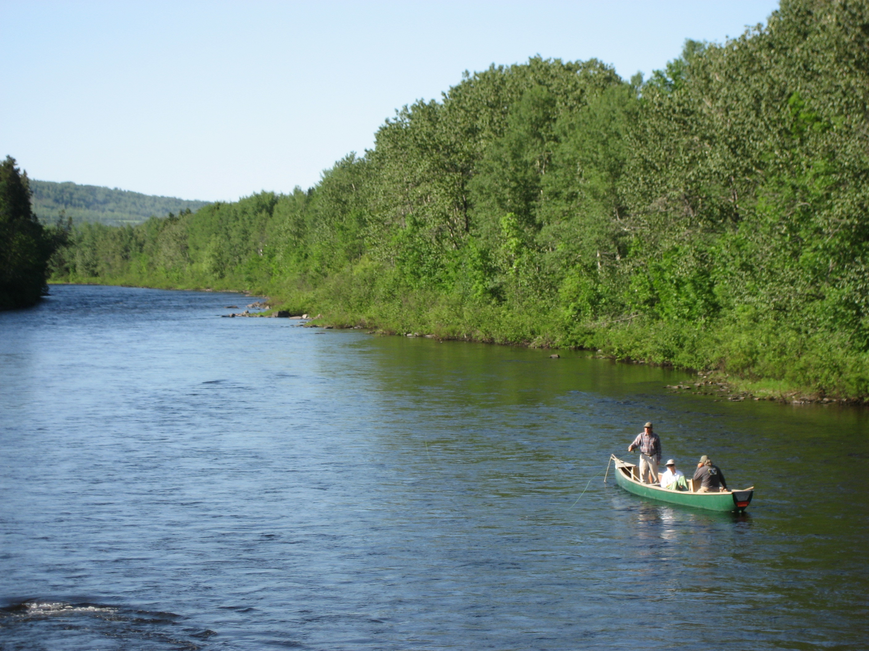 Pêcheurs de saumons atlantique en canot sur la rivière Matapédia au Québec.